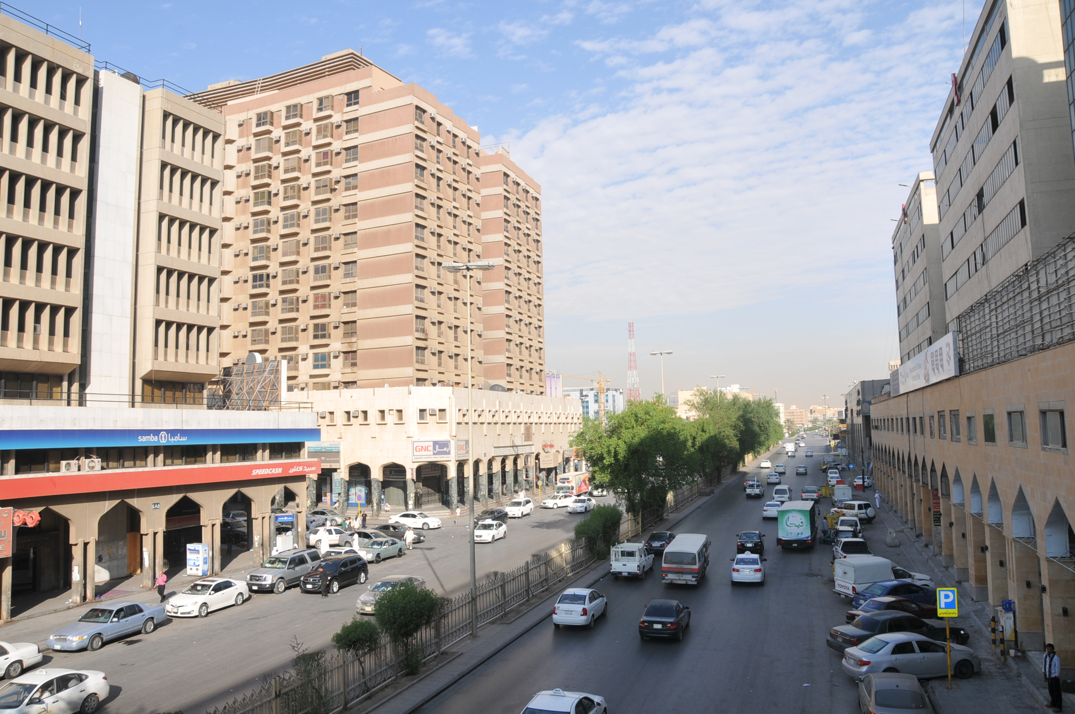 Al Futah, Riyadh Saudi Arabia